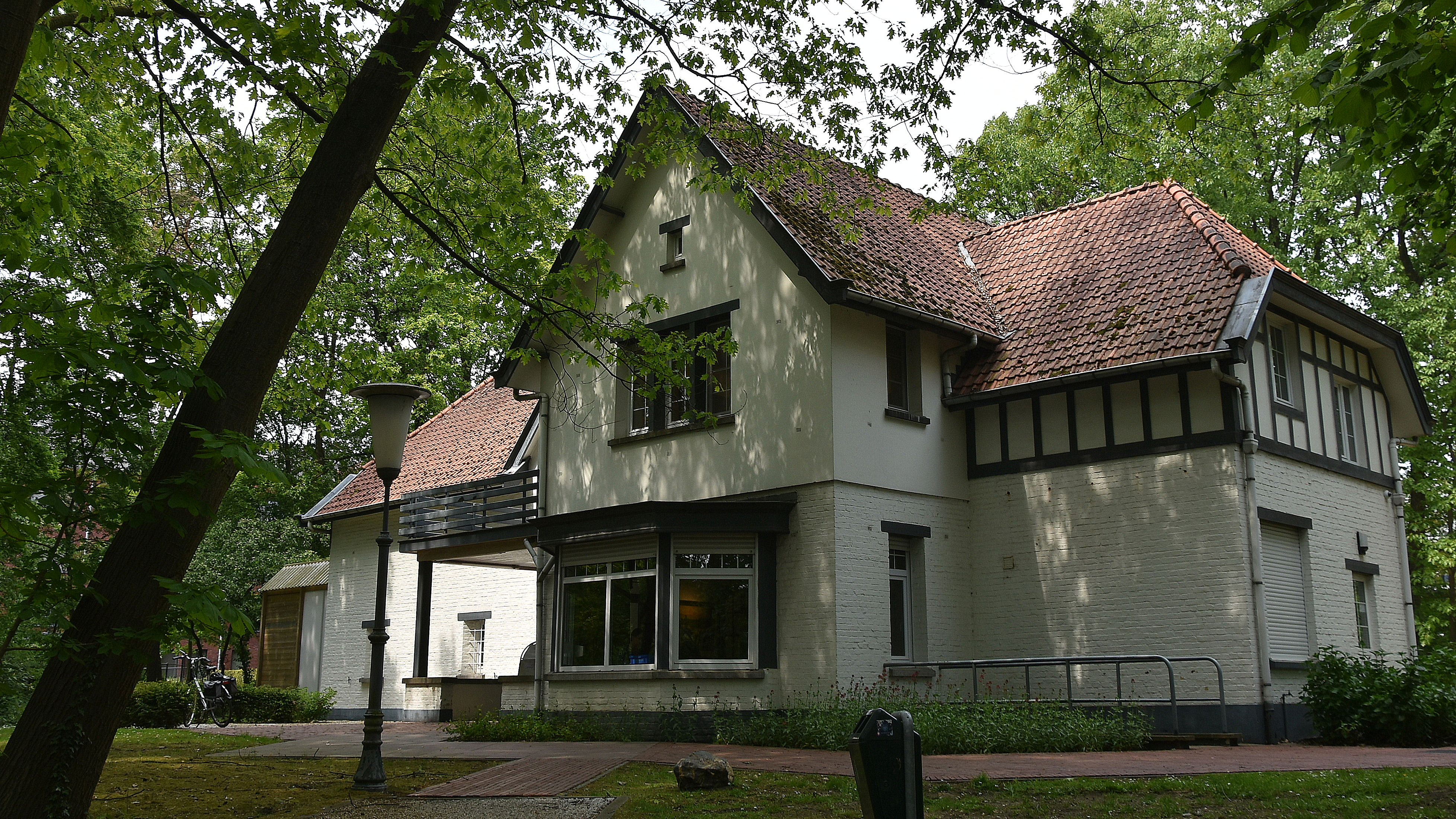 Villa Le Coin Perdu (Emile Van Dorenmuseum) (304693) Genk 19-05-2019